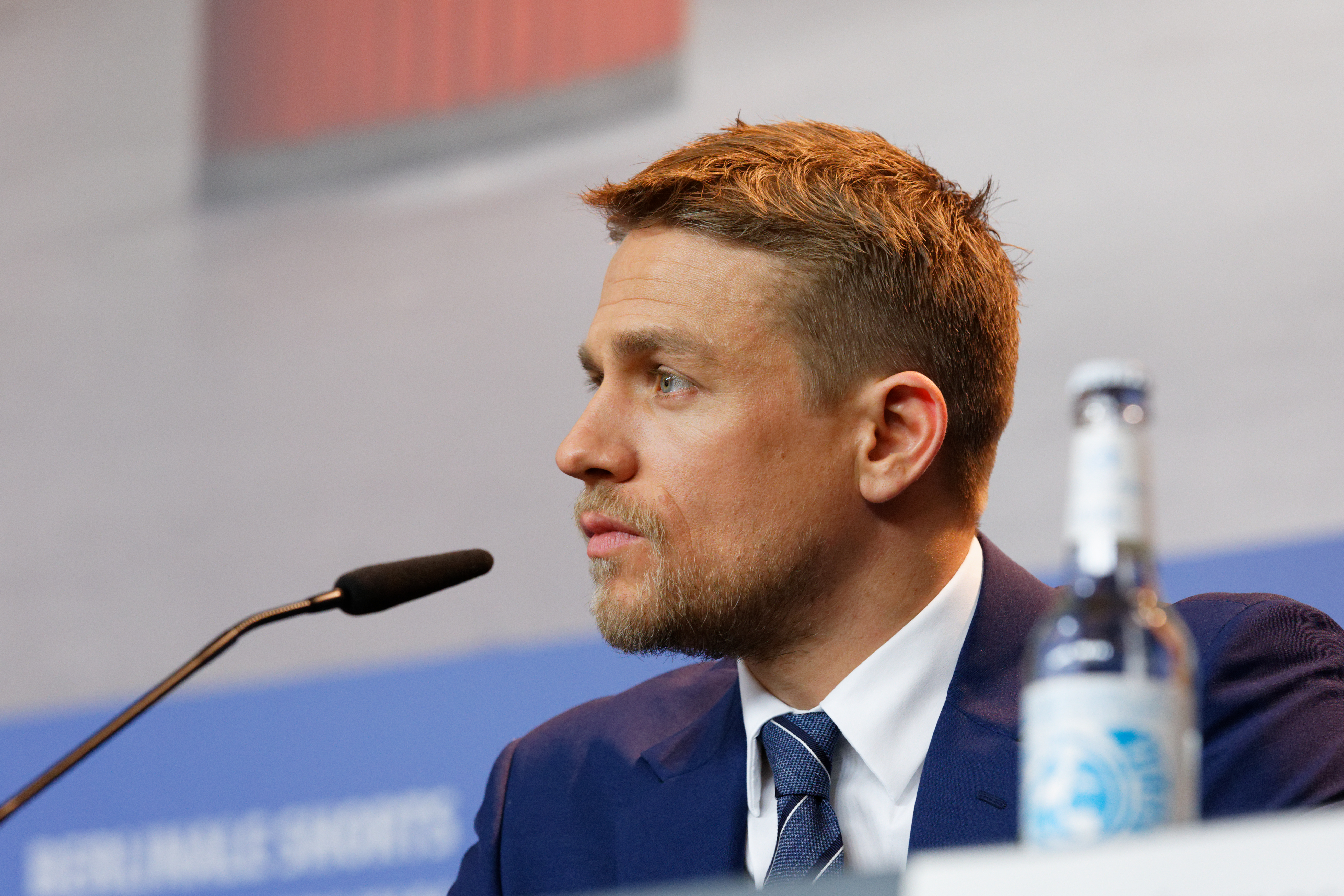 Charlie Hunnam bei der Pressekonferenz zu Die verlorene Stadt Z bei der Berlinale 2017